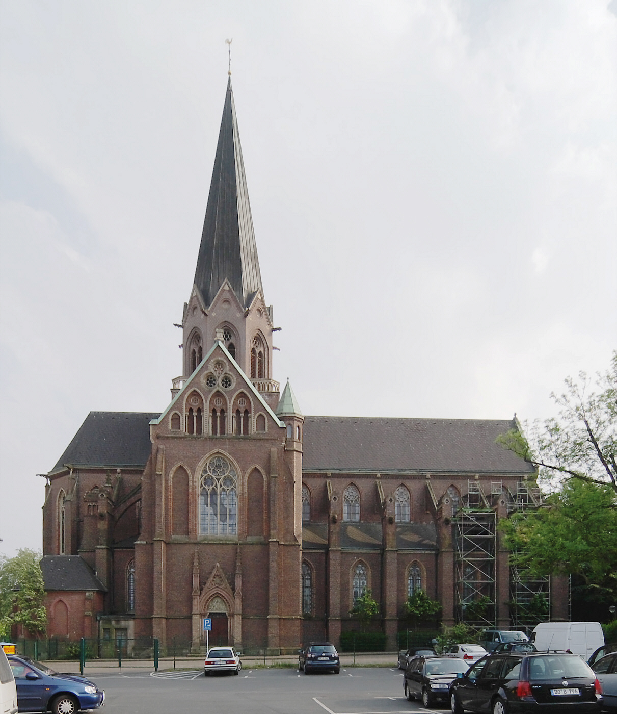 Stiftskirche Dortmund Hörde